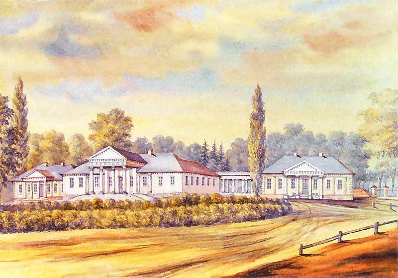 Беларуская (тарашкевіца): Кухцічы (Kuchcičy), сядзіба Завішаў (Zaviša)